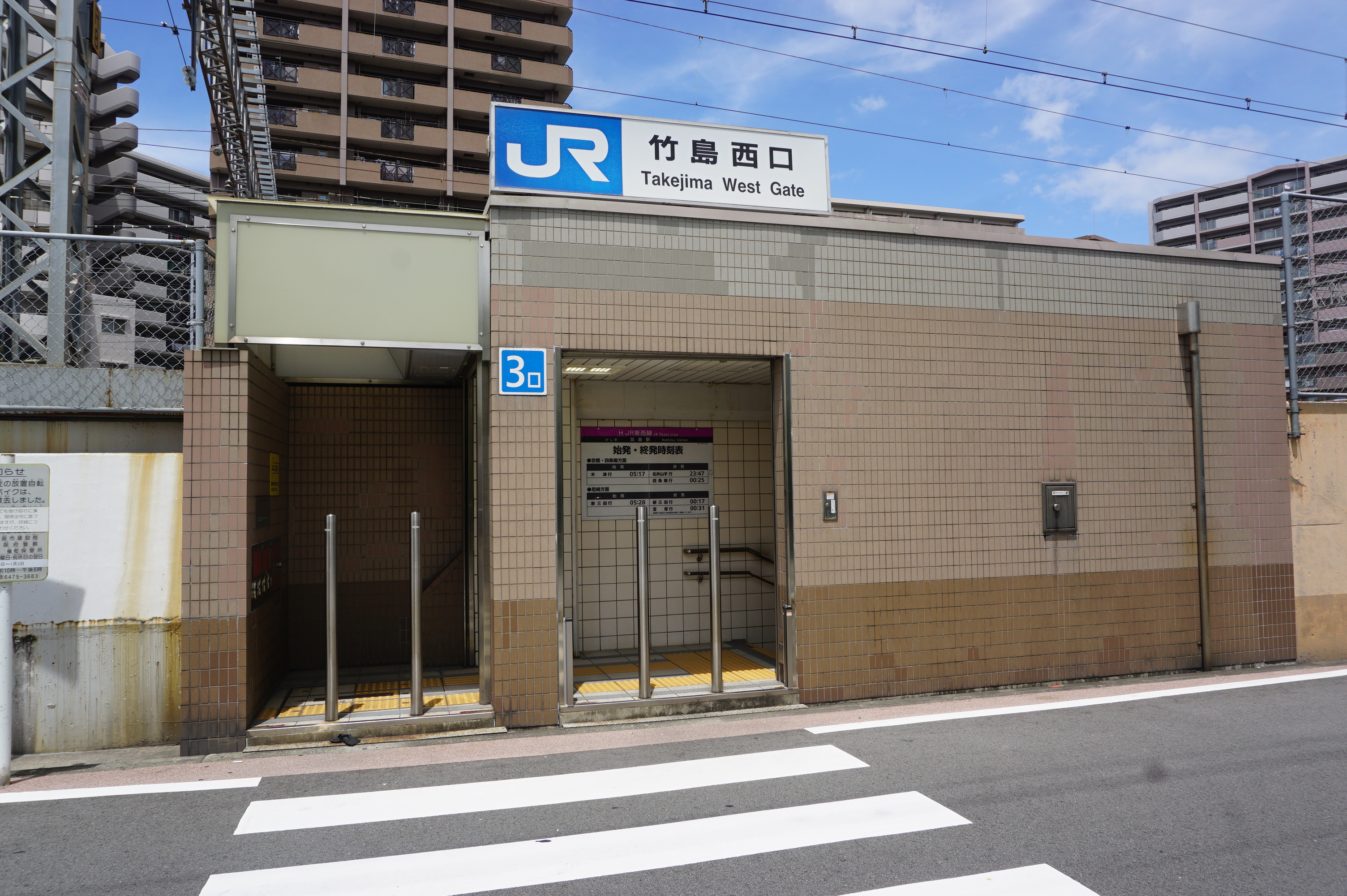 加島駅の南口。「竹島西口」とだけ書かれている。2020年7月撮影。 Sony ILCE-6000